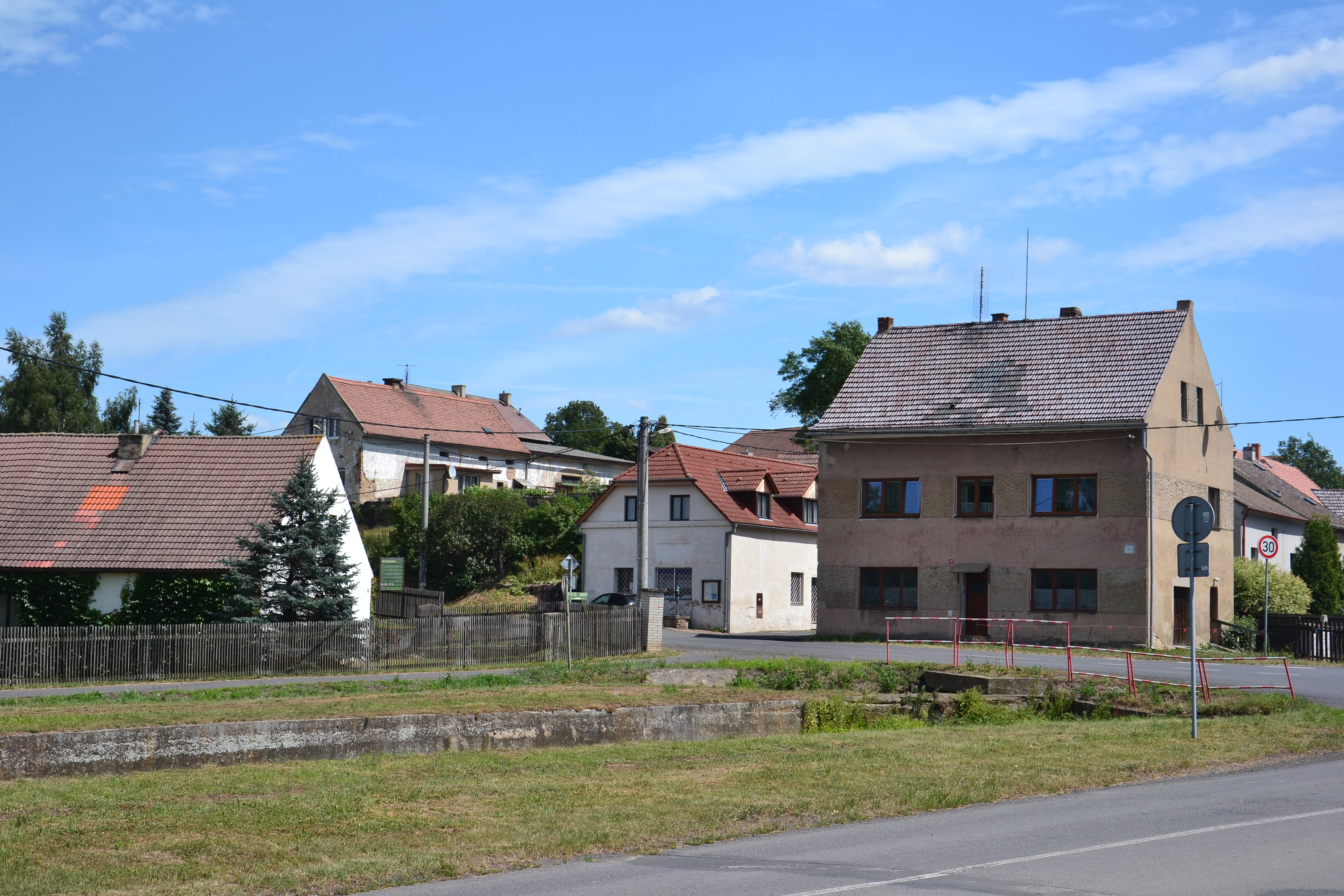 Náves